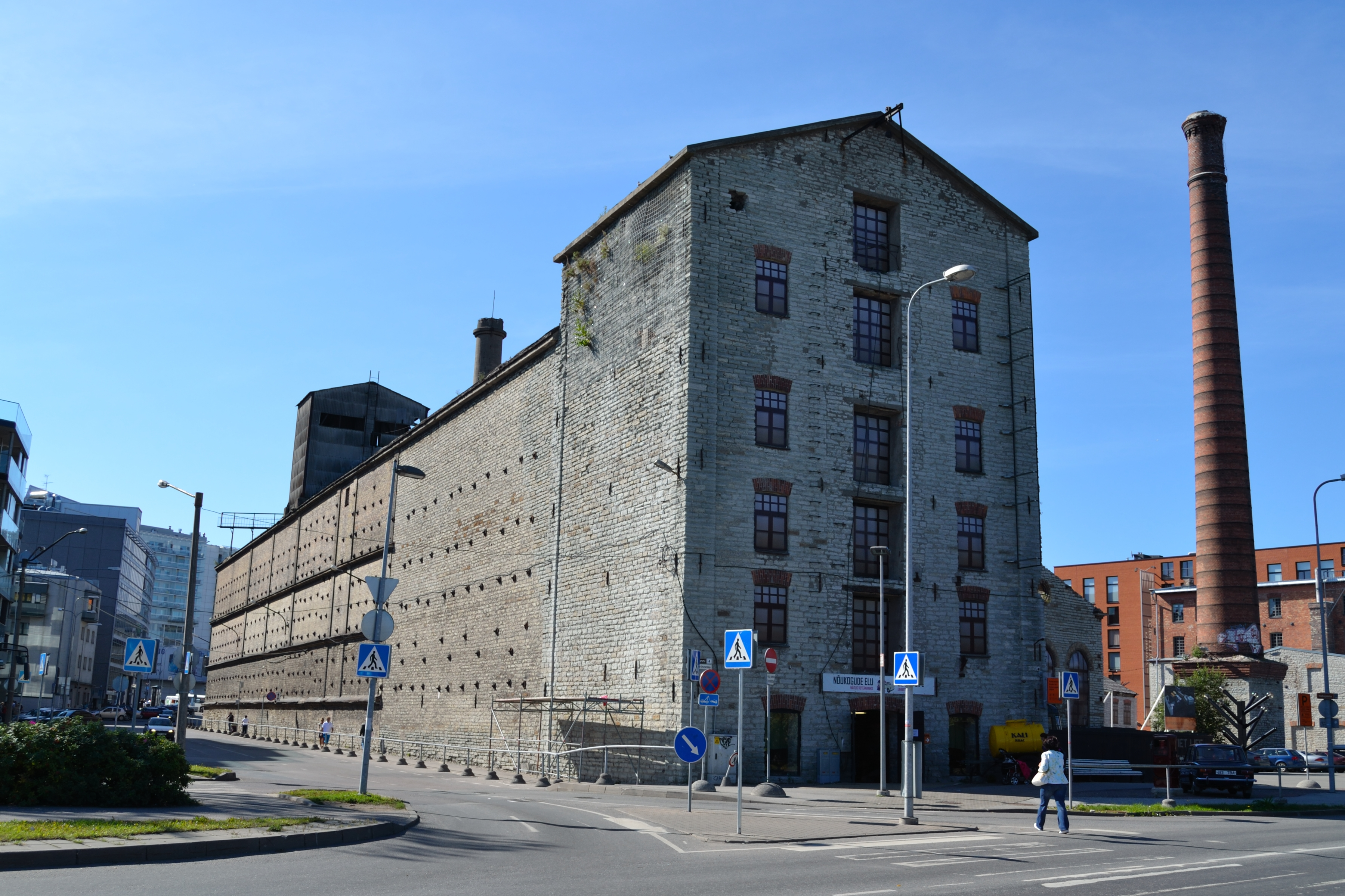 Tallinn, Rotermanni tehase elevaatorihoone fassaadid, 1904-1930